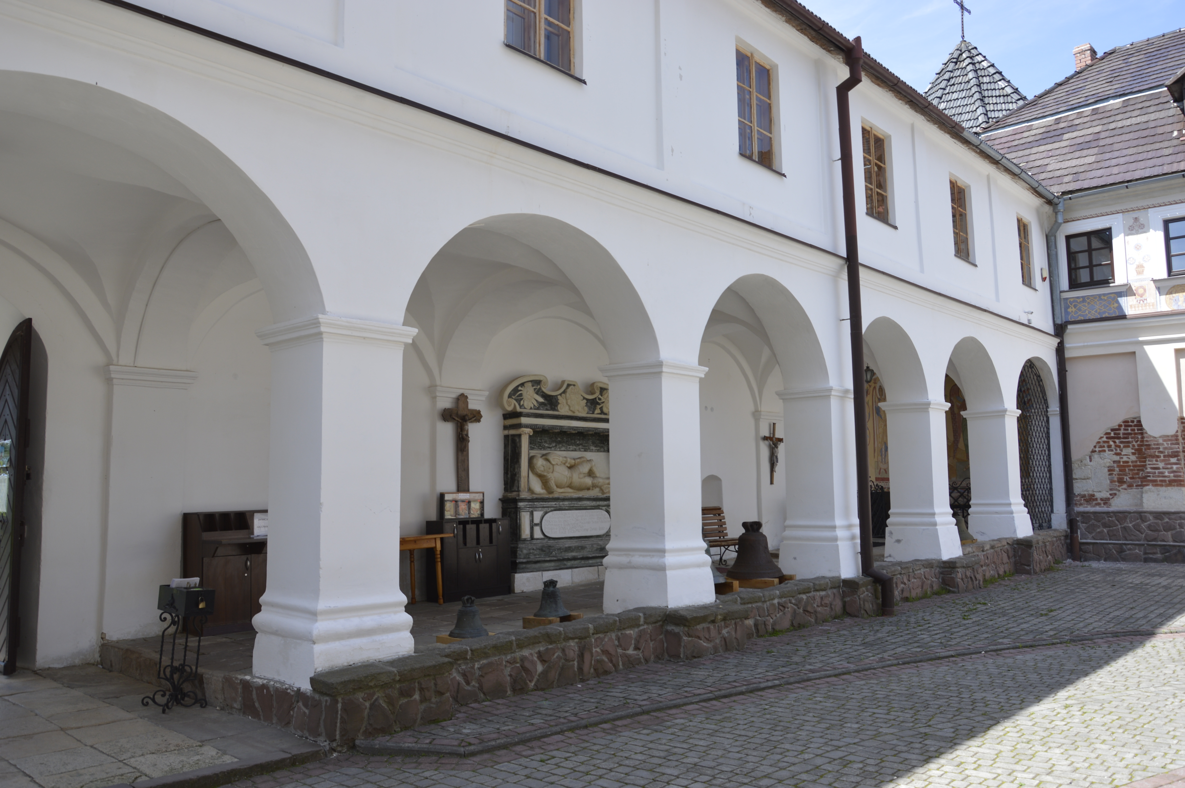 Унівський монастир-фортеця, Унів (Міжгір'я), на північ від села